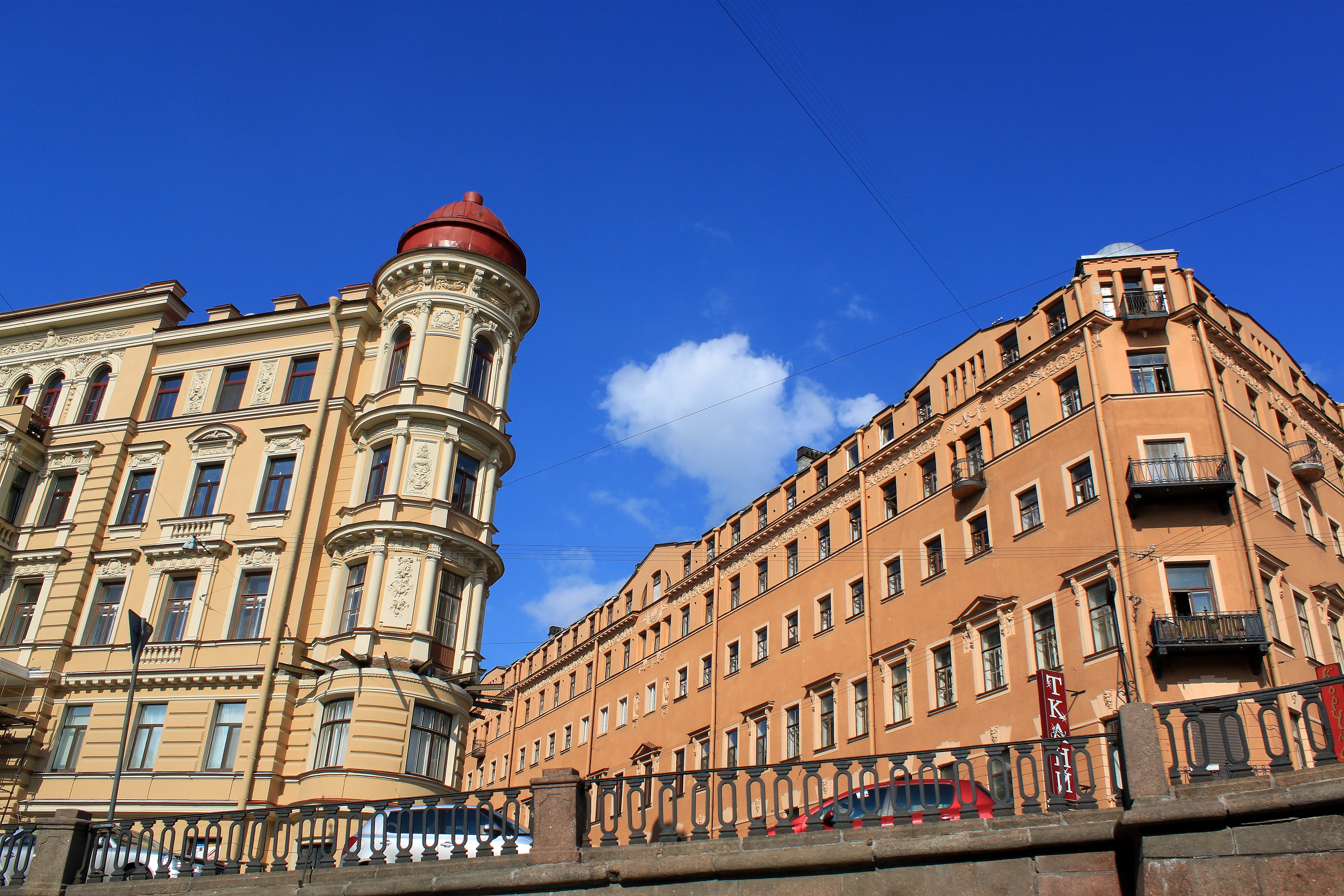 острый угол